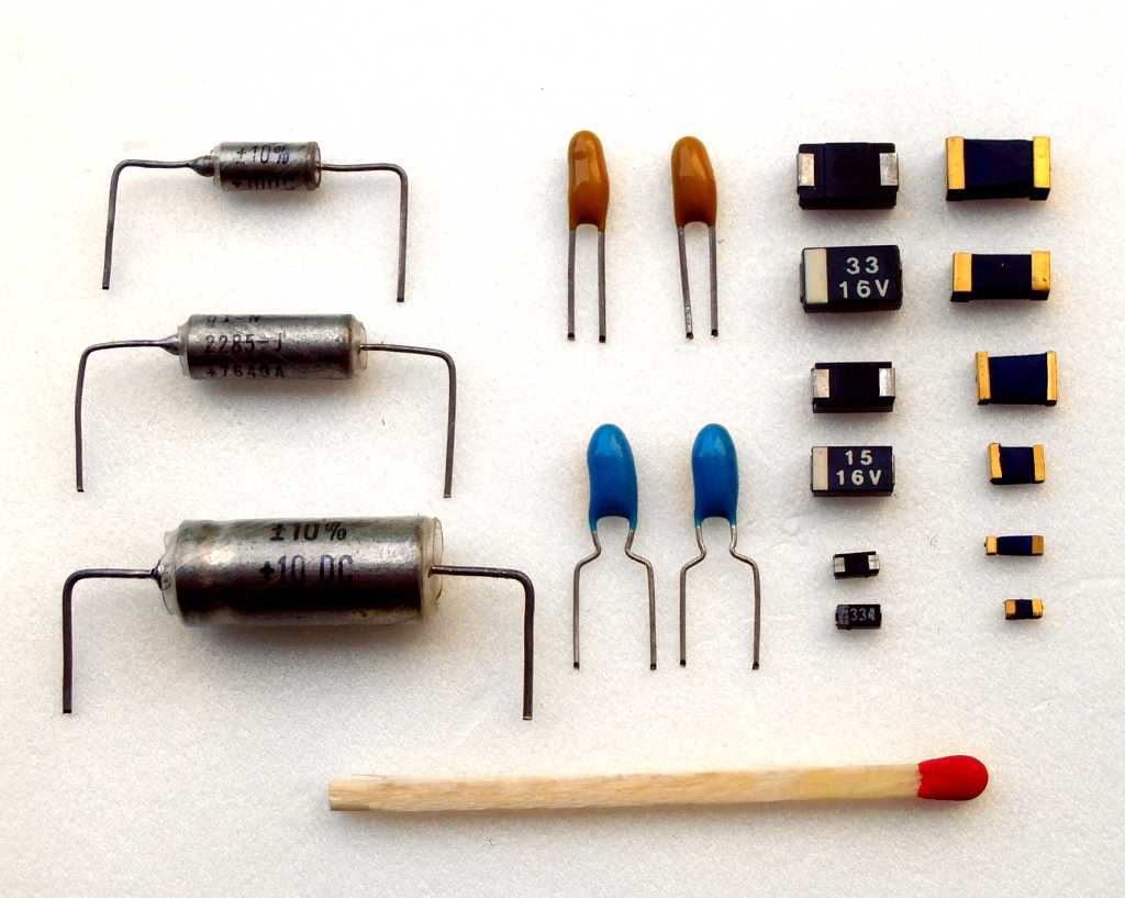 verschiedene Bauformen von Tantal-Elektrolytkondensatoren